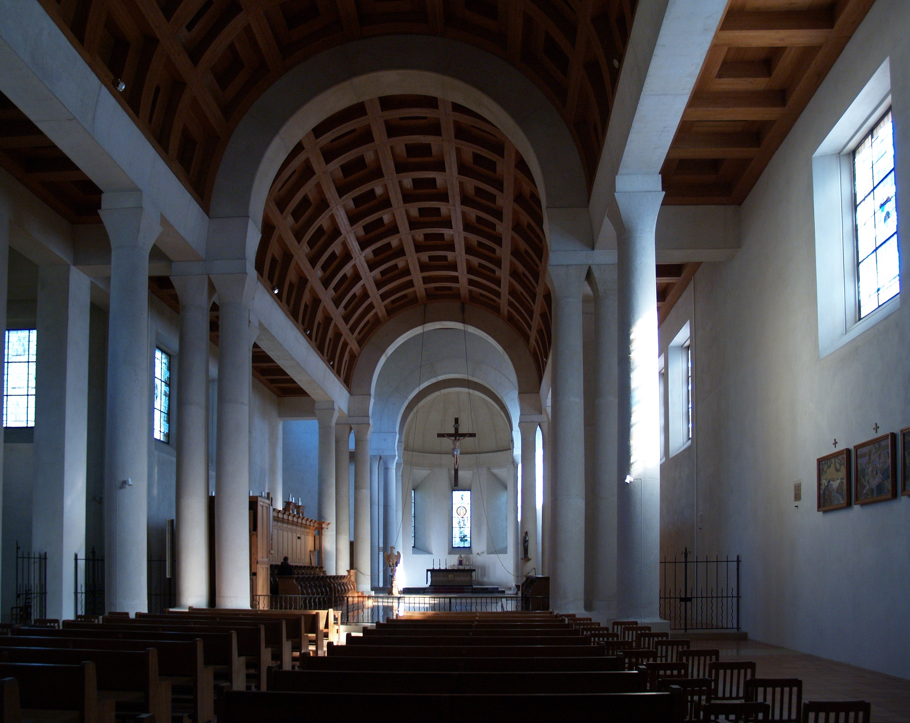 abbaye bénédictine de Triors en France. Construction fin XXe siècle, style roman-provençal, à partir d'un château XVIIIe.